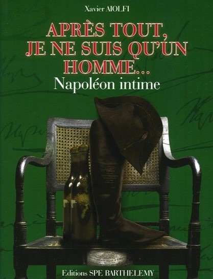 Au travers d ’une étude ludique et incisive, nous vous invitons à pénétrer dans l’intimité de la gloire de Napoléon